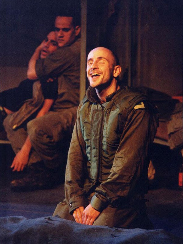 ההצגה סוג'וד